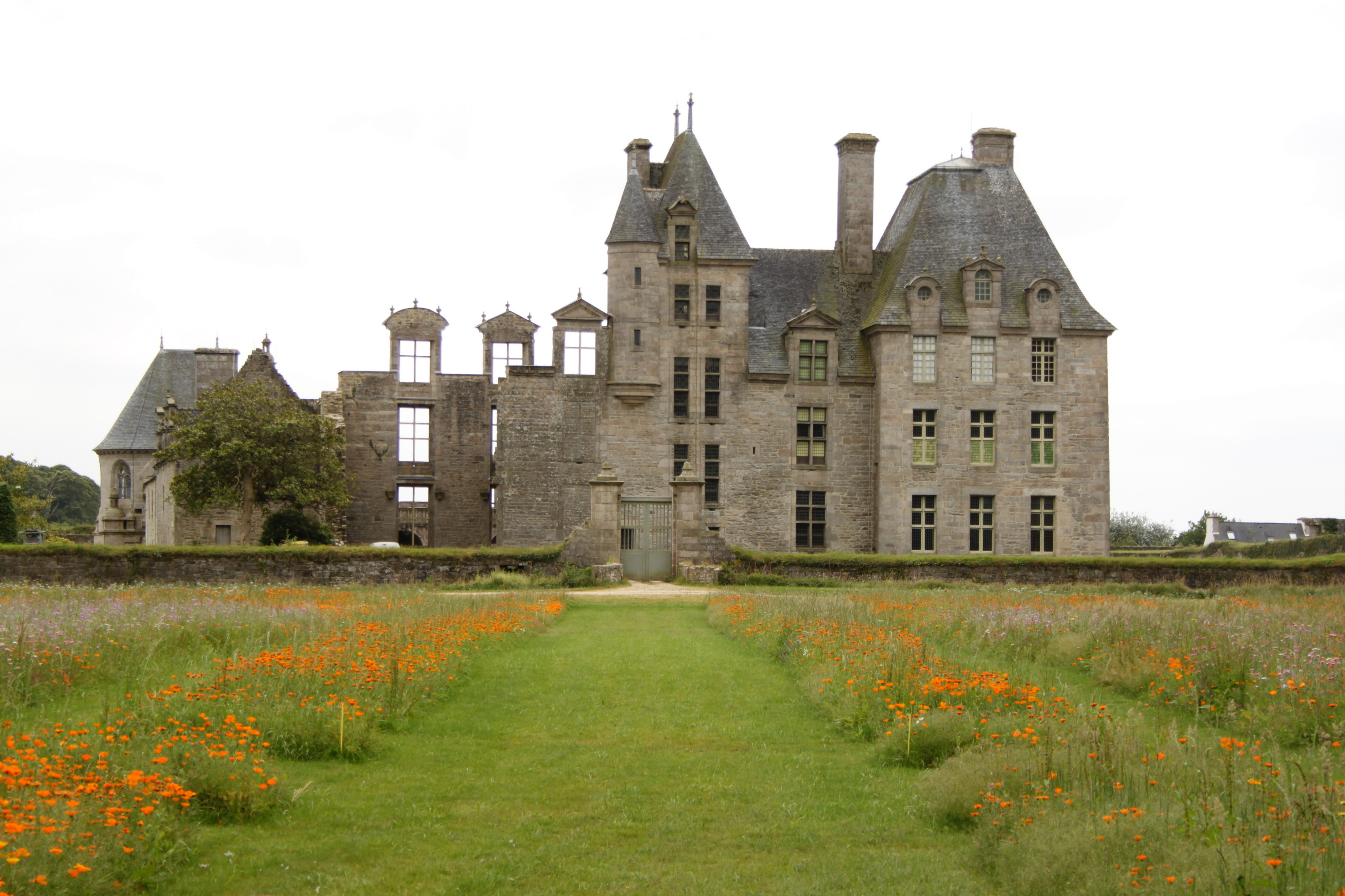 Le château de Kerjean, Bretagne